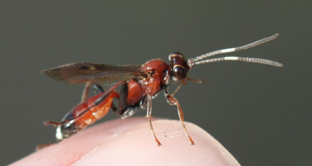 Schlupfwespe, vermutlich Crytea sanguinator, am 7. April 2019 in der Schwetzinger Hardt